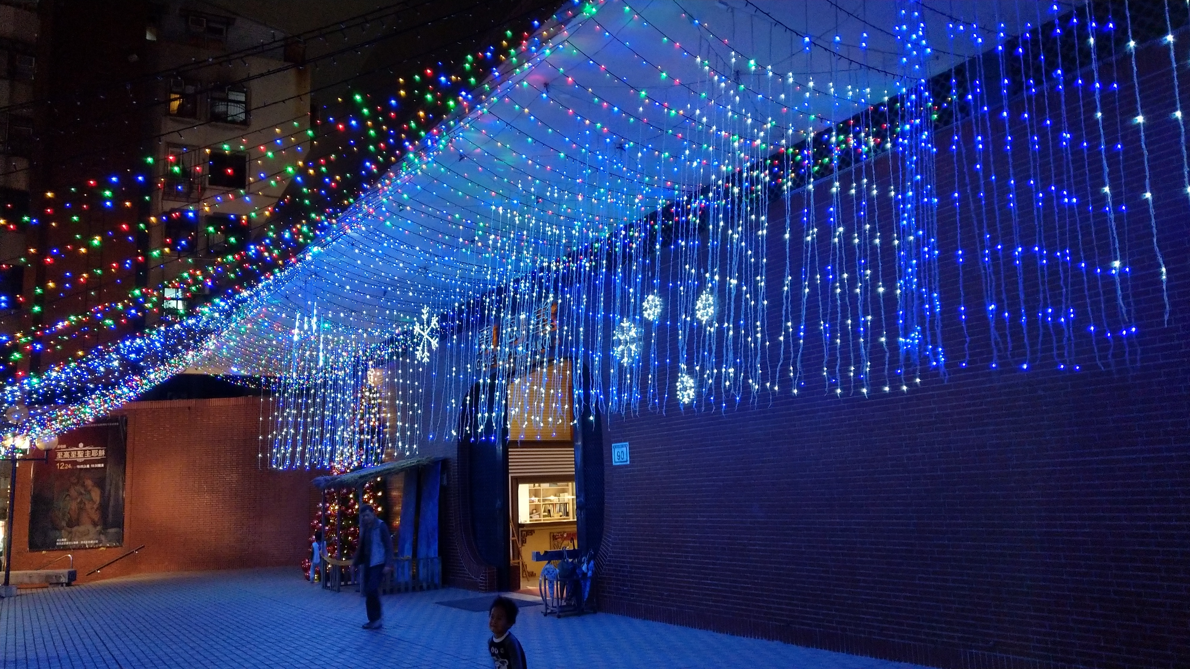 台北懷恩堂在聖誕節的布置